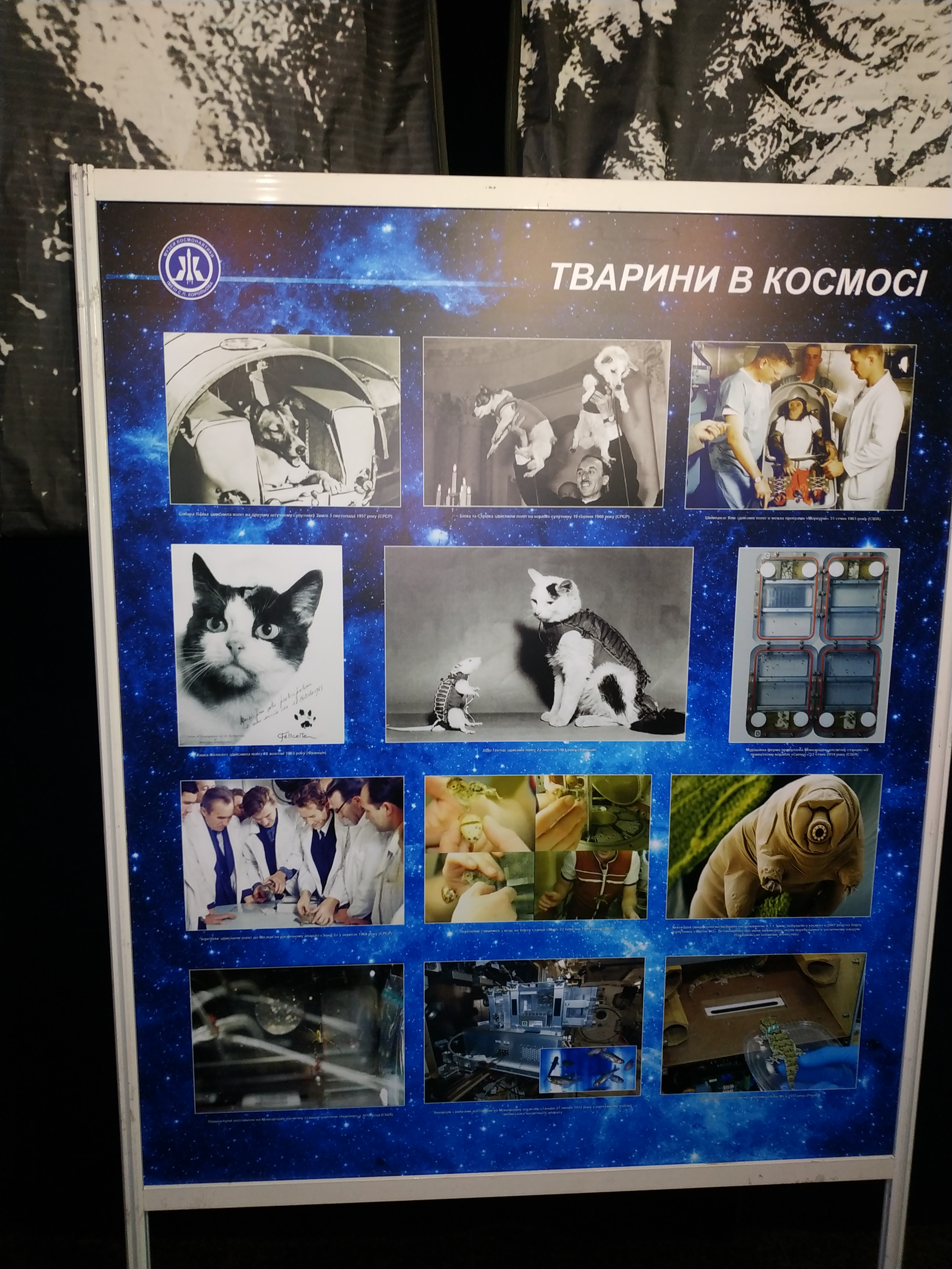 Стенд тварини в космосі